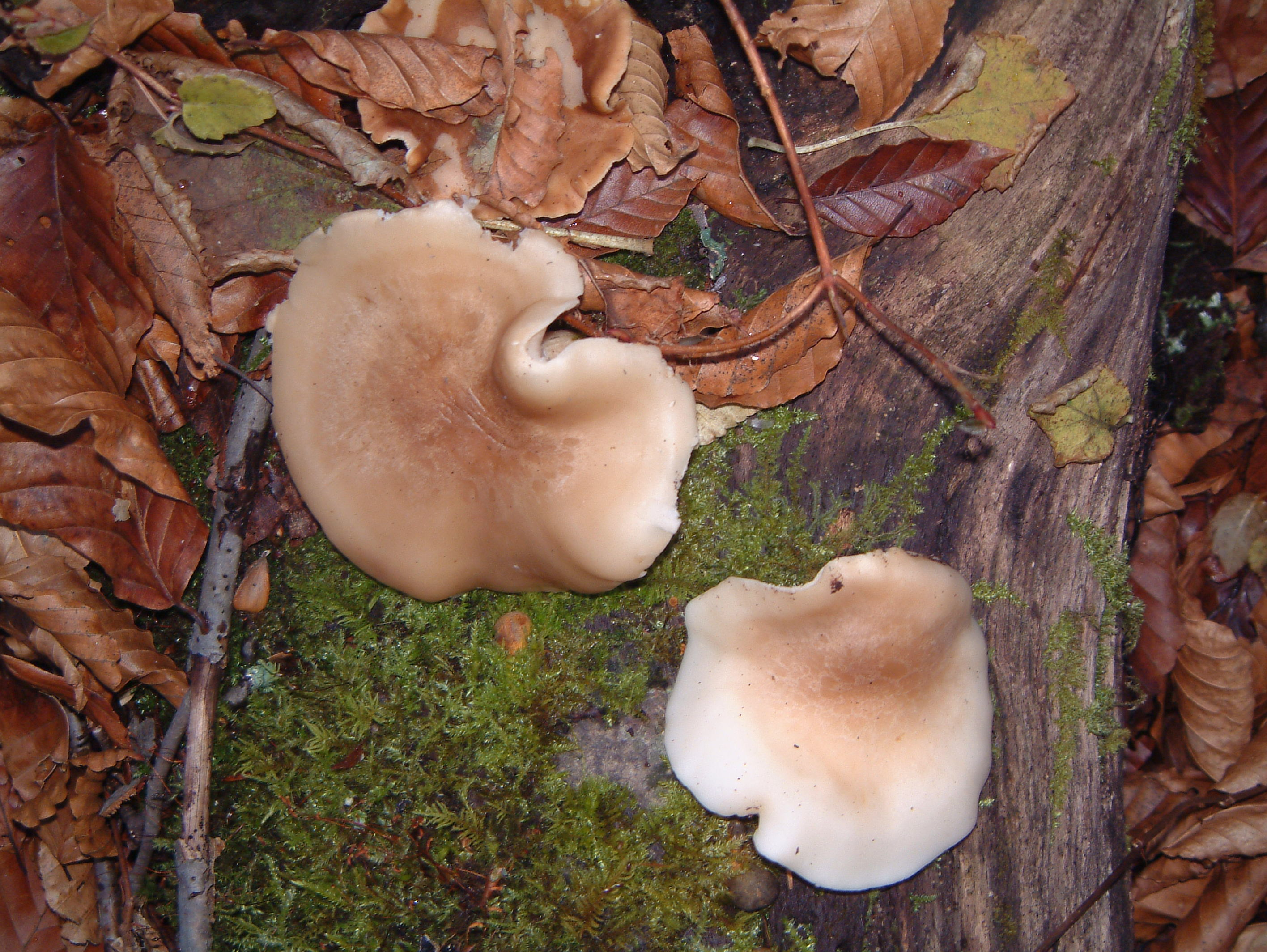 ブナシメジ、群馬県武尊山にて撮影